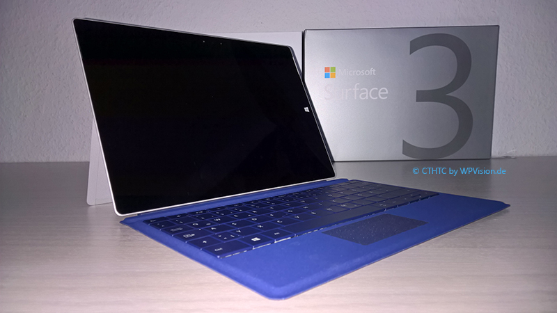 Microsoft Surface 3